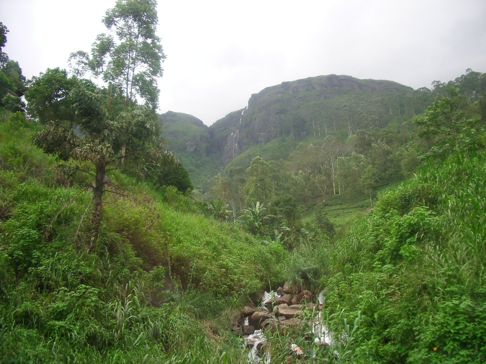 Central province, Sri Lanka, foto feta per J. Ollé el juliol del 2006